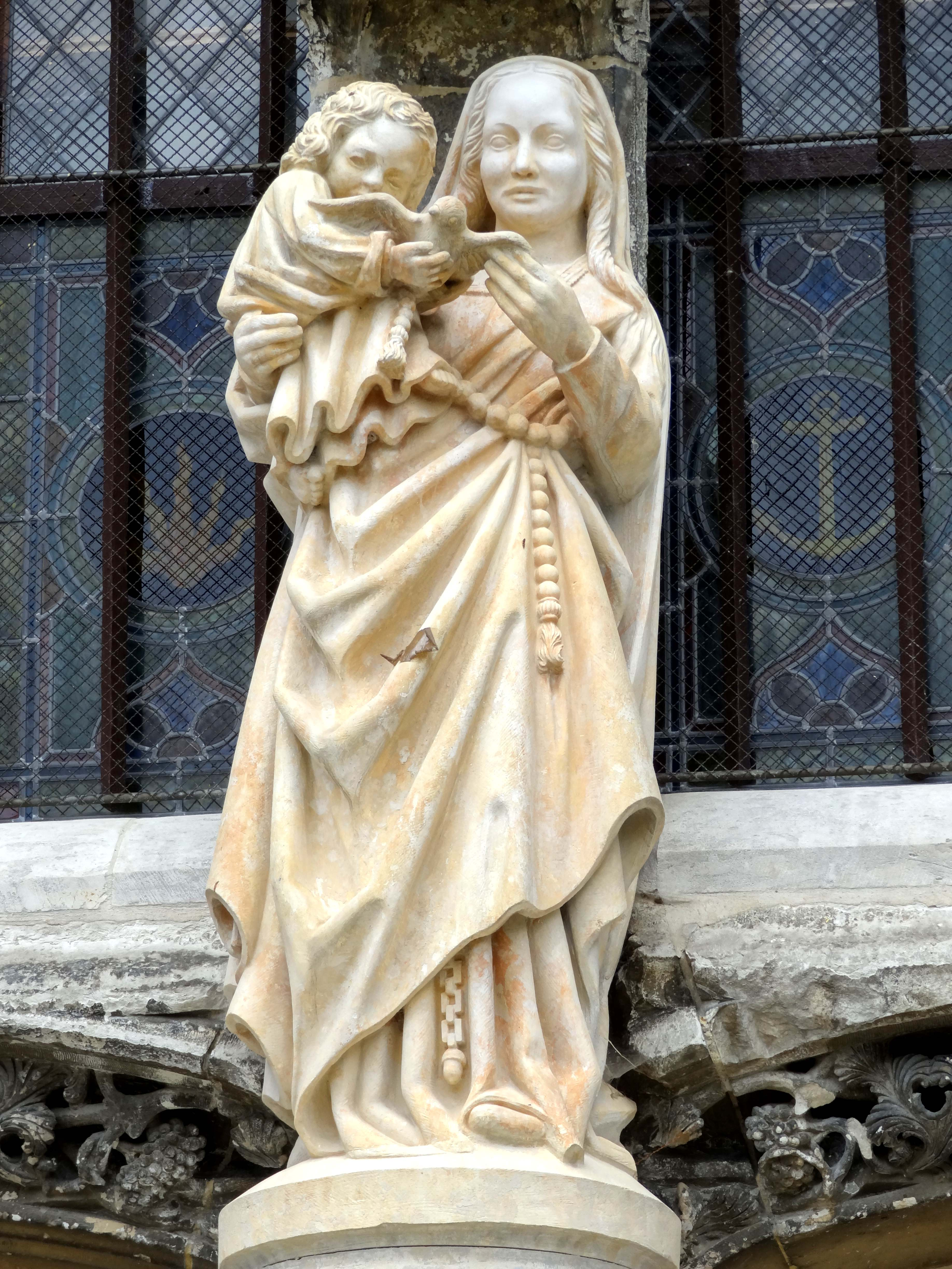 Église Notre-Dame de Marissel - voir titre.